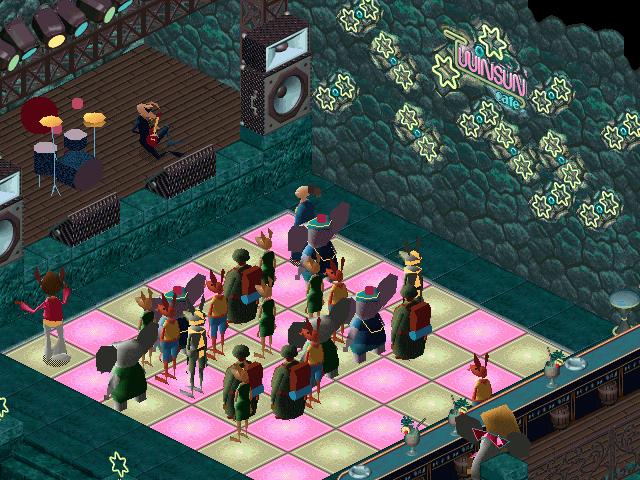 Capture d'écran du jeu vidéo Little Big Adventure (1994), développé par Adeline Software International.